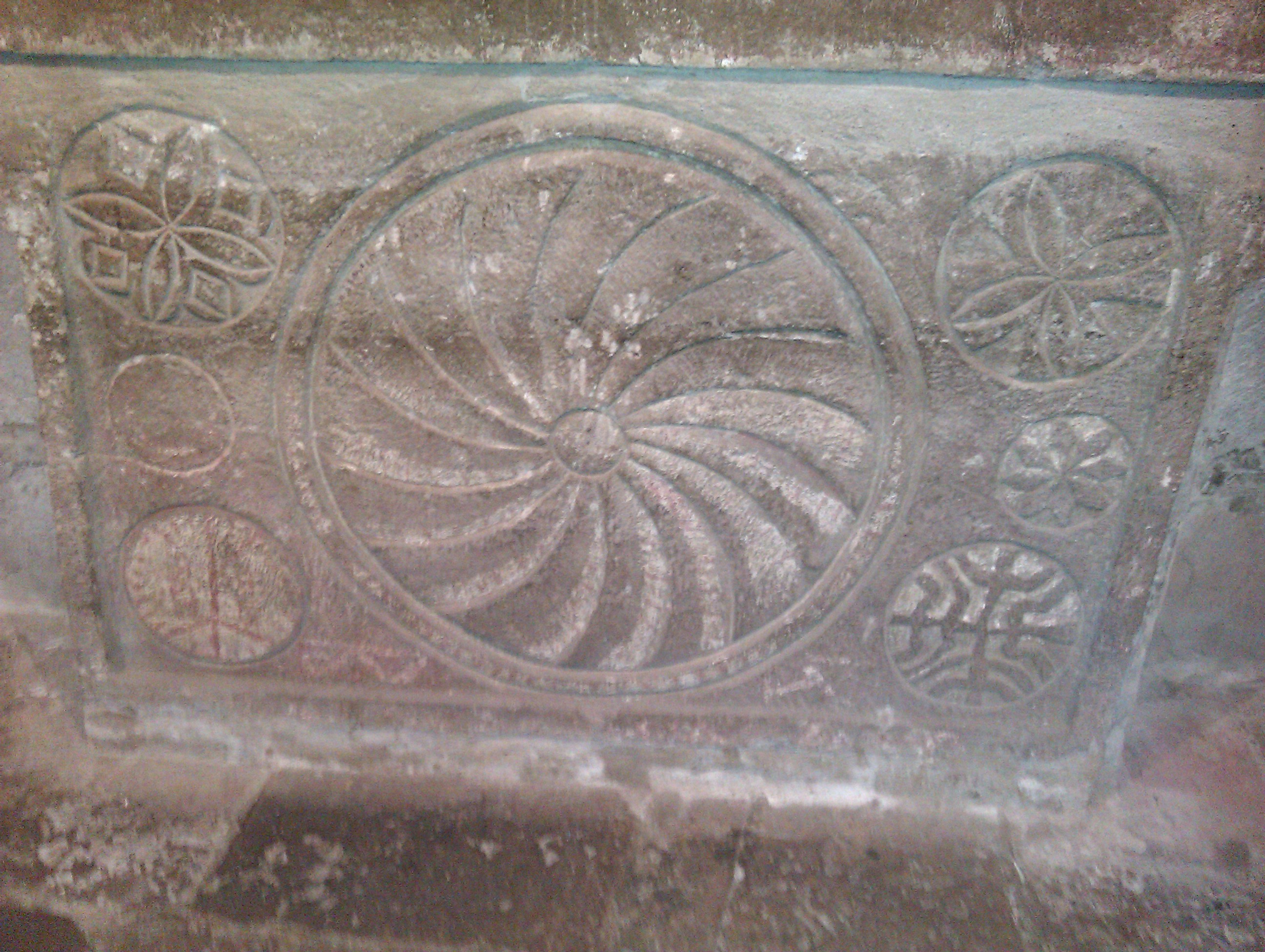 Estela, segurament pre-cristiana, a l'esglèsia de Santa Maria de Lebeña (Cirolligo-Castro, Liébana, Cantàbria). Havia estat tombada sota l'altar i en unes obres després del concili vaticà II es va descobrir.